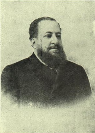 Felipe Sánchez Román , ministro de Estado.